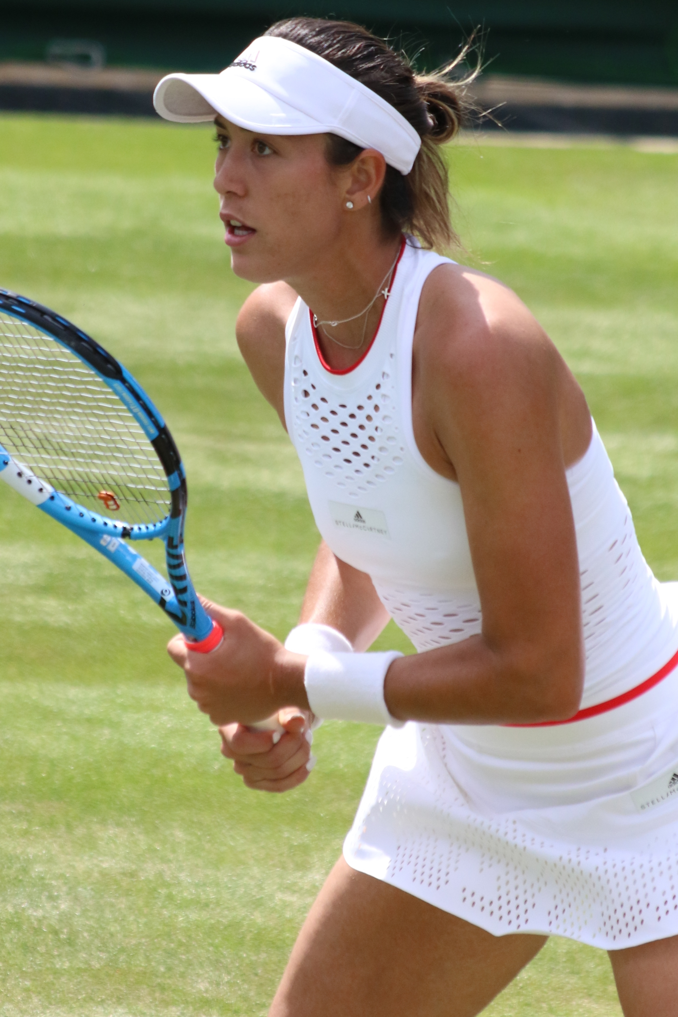 Muguruza WM19 (66)